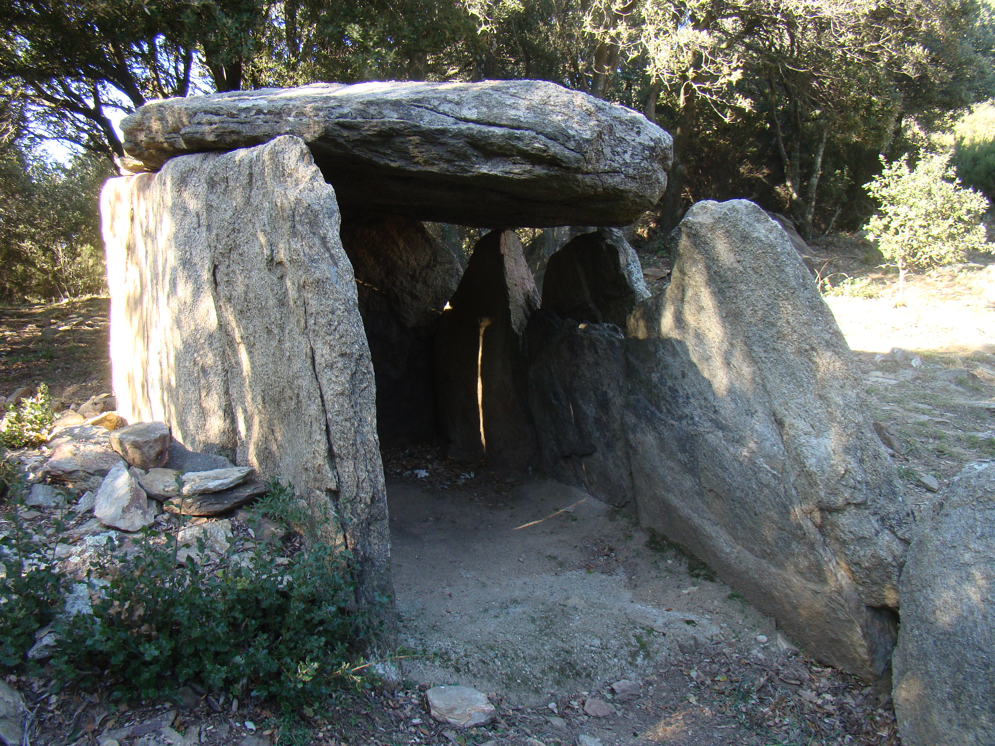 Vue du dolmen de Balma de Na Cristiana de face, légèrement à gauche